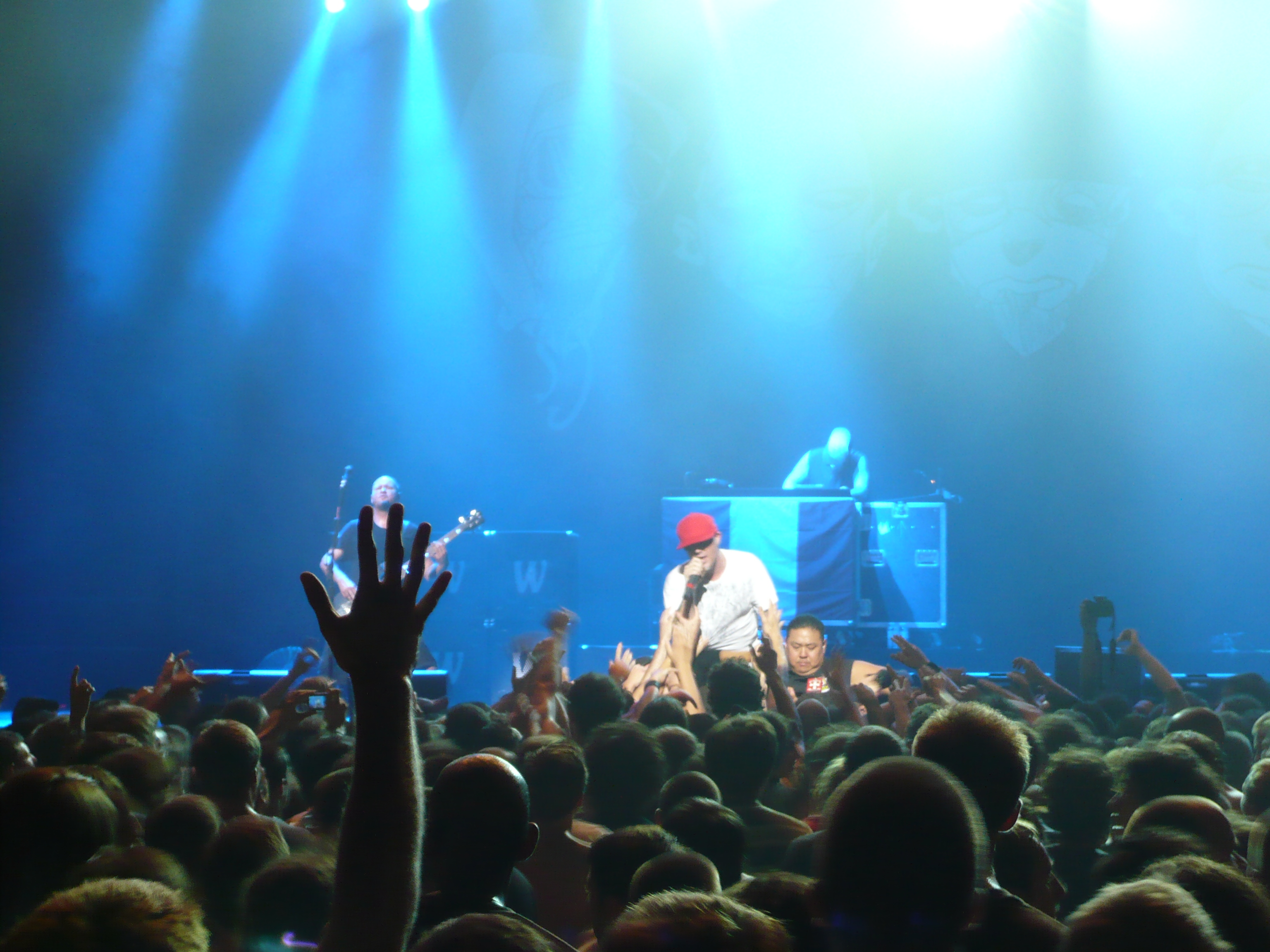 Limp Bizkit on Le Zénith, Paris